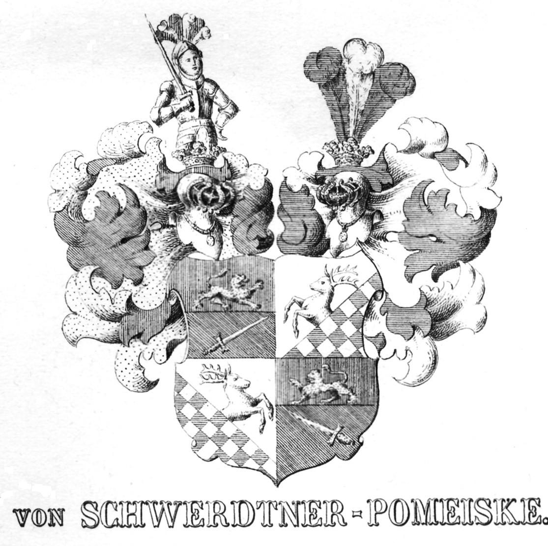 Wappen der Familie von Schwerdtner-Pomeiske (preuß. Namen- und Wappenvereinigung mit „Pomeiske“, geknüpft an den Besitz von Groß-Pomeiske, Berlin 6. Januar 1845 für Otto von Schwerdtner auf Ilkendorf bei Nossen und Groß-Pomeiske, Kreis Bütow).